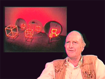 Portrait de Piotr Kowalski